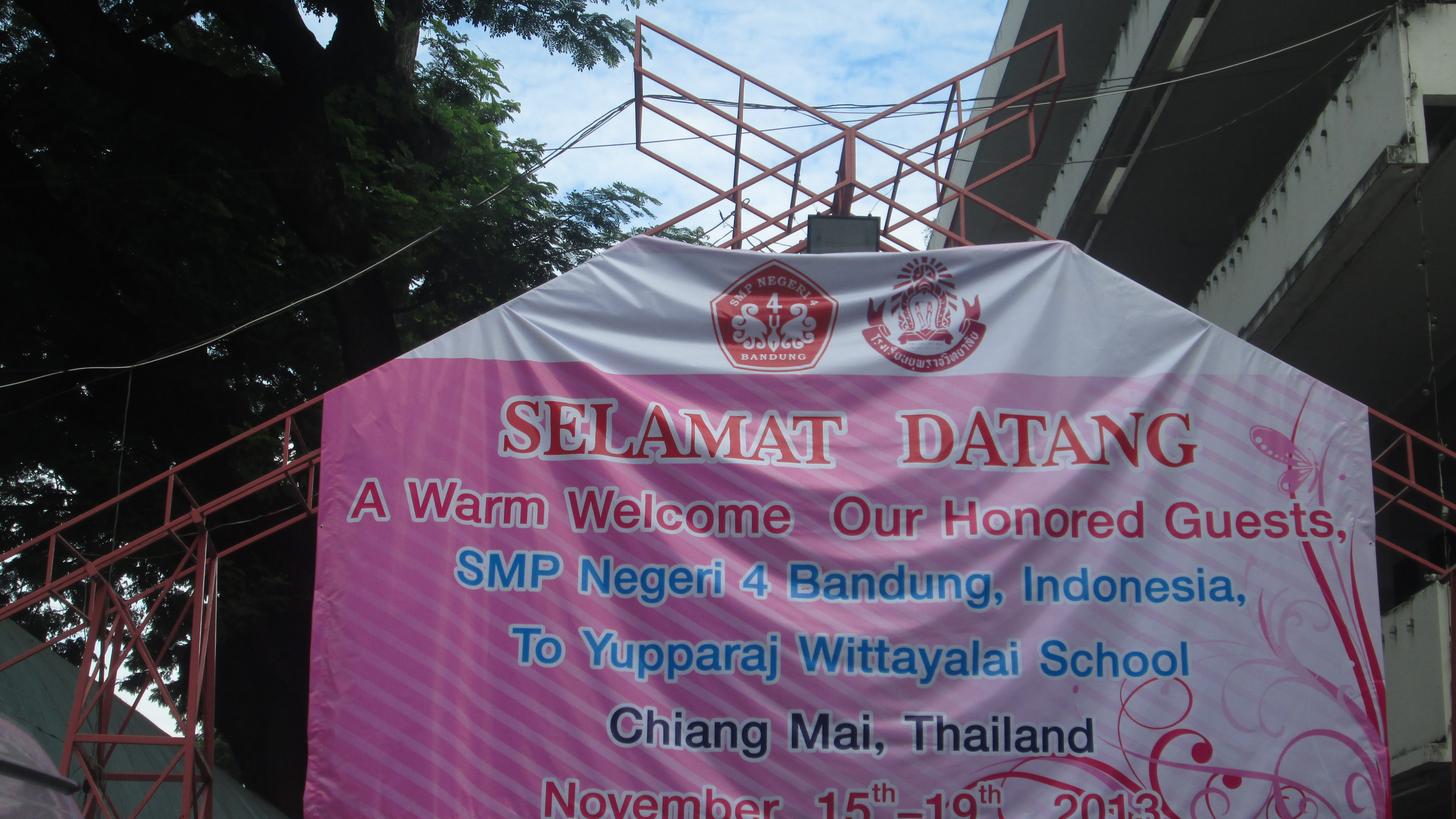 Spanduk SMP Negeri 4 Bandung di Chiangmai. Sebagai ucapan selamat datang dari pihak sekolah Yuparraj Witayallai School THAI